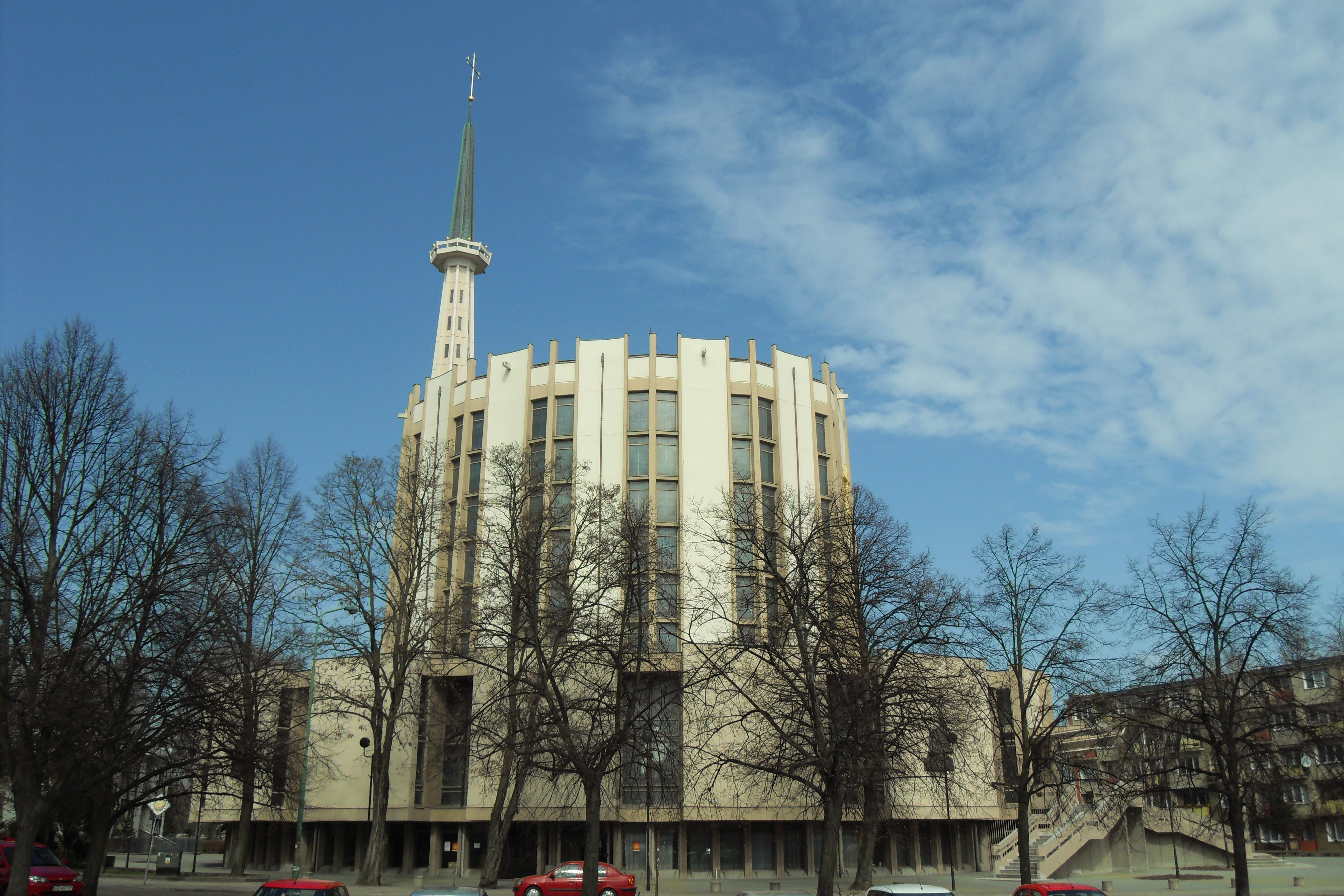 Gdańsk Przymorze. Kościół parafialny NMP Królowej Różańca Świętego, pl. Najświętszej Maryi Panny 1.